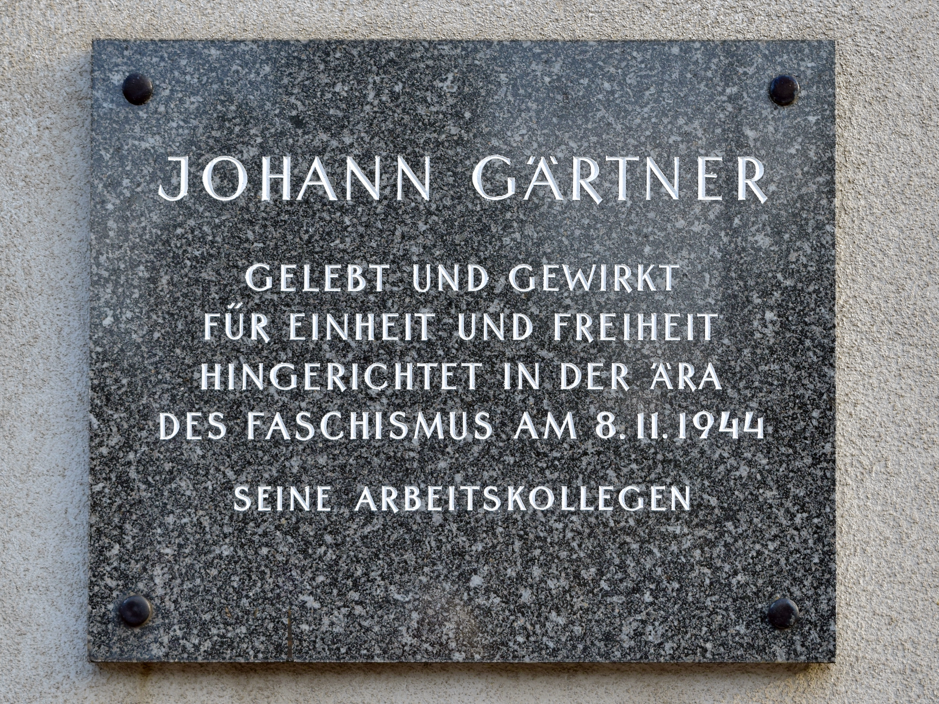 Gedenktafel für Johann Gärtner bei der Straßenbahnremise Rudolfsheim